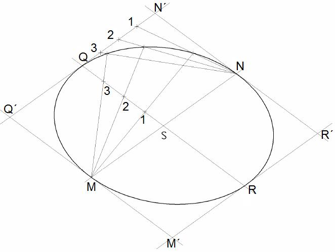 Příčková kostrukce elipsy